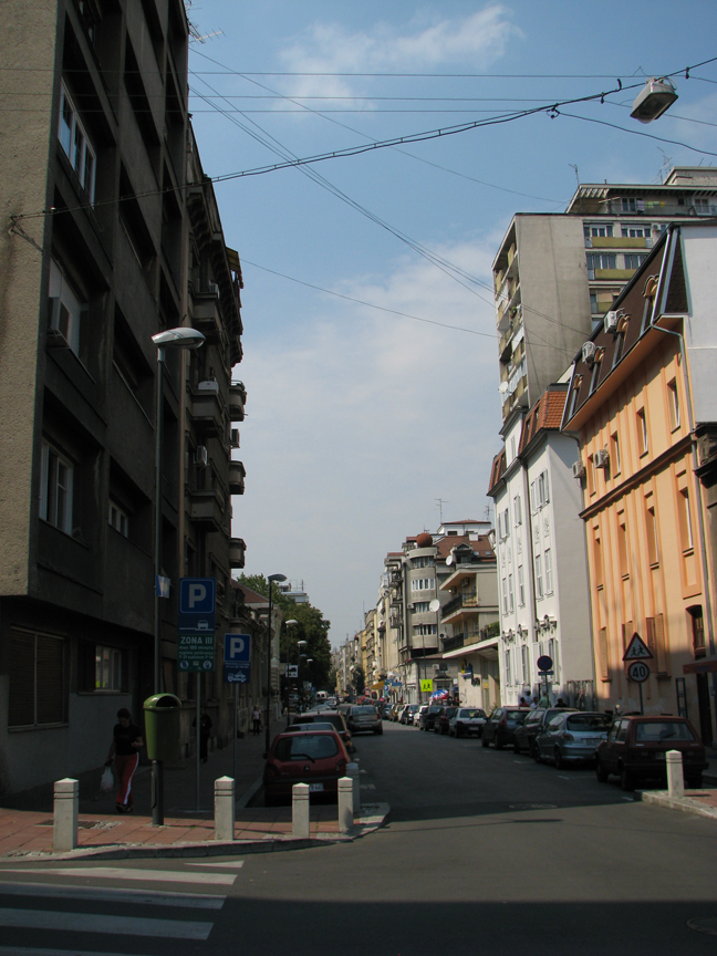 Gospodar Jovanova street in , Serbia/La rue Gospodar Jovanova à , Serbie